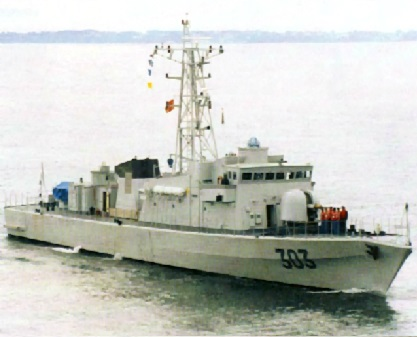 Vigilance Class 303 - Triki - Royal Moroccan Navy.